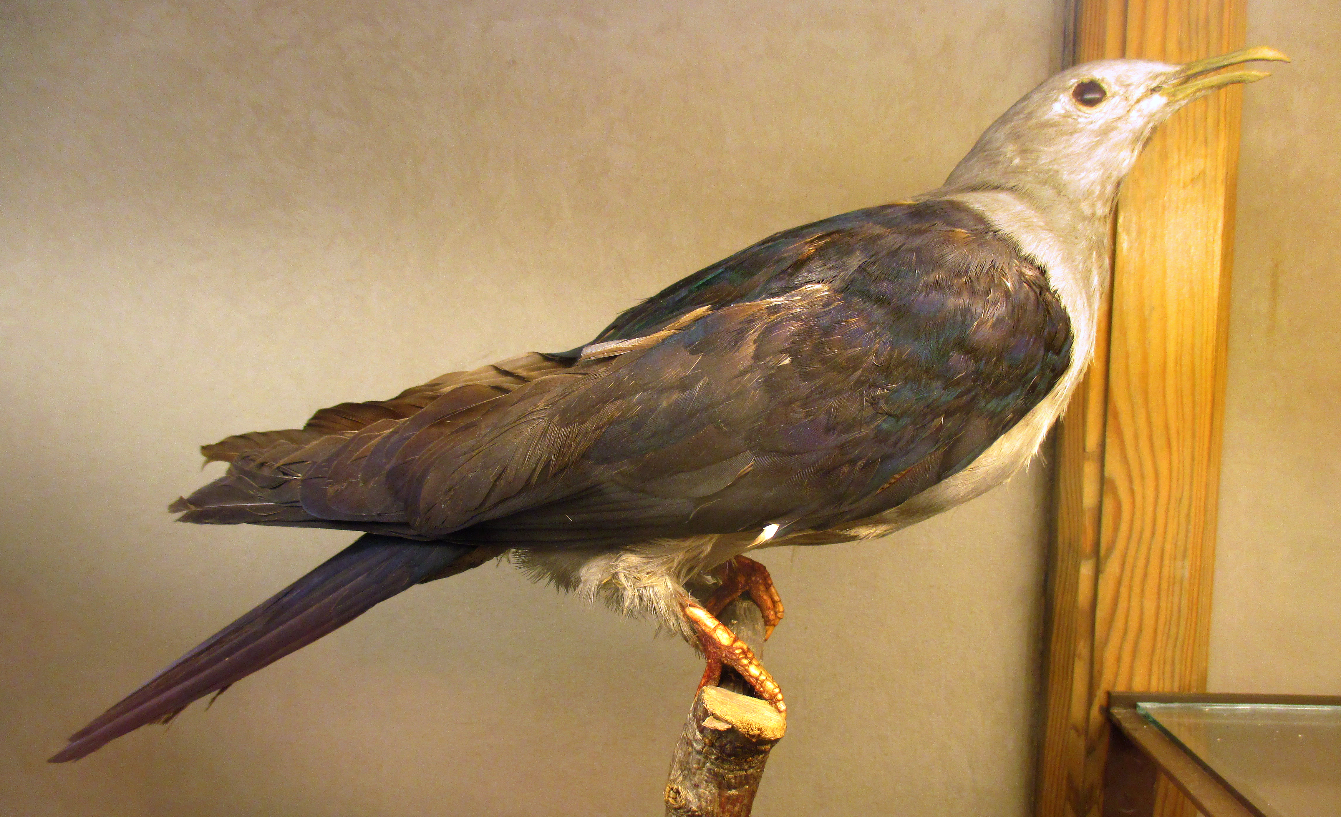 Uppstoppad nikobarkejsarduva (Ducula nicobarica) från Nikobarerna på Göteborgs Naturhistoriska Museum, Göteborg, Sverige.Skylten vid fågeln lyder:"Nikobar-fruktduva.Carpophaga insularis Blyth.Nikobarerna, Indiska arkipelagen.1891. Av. ex. 3732."